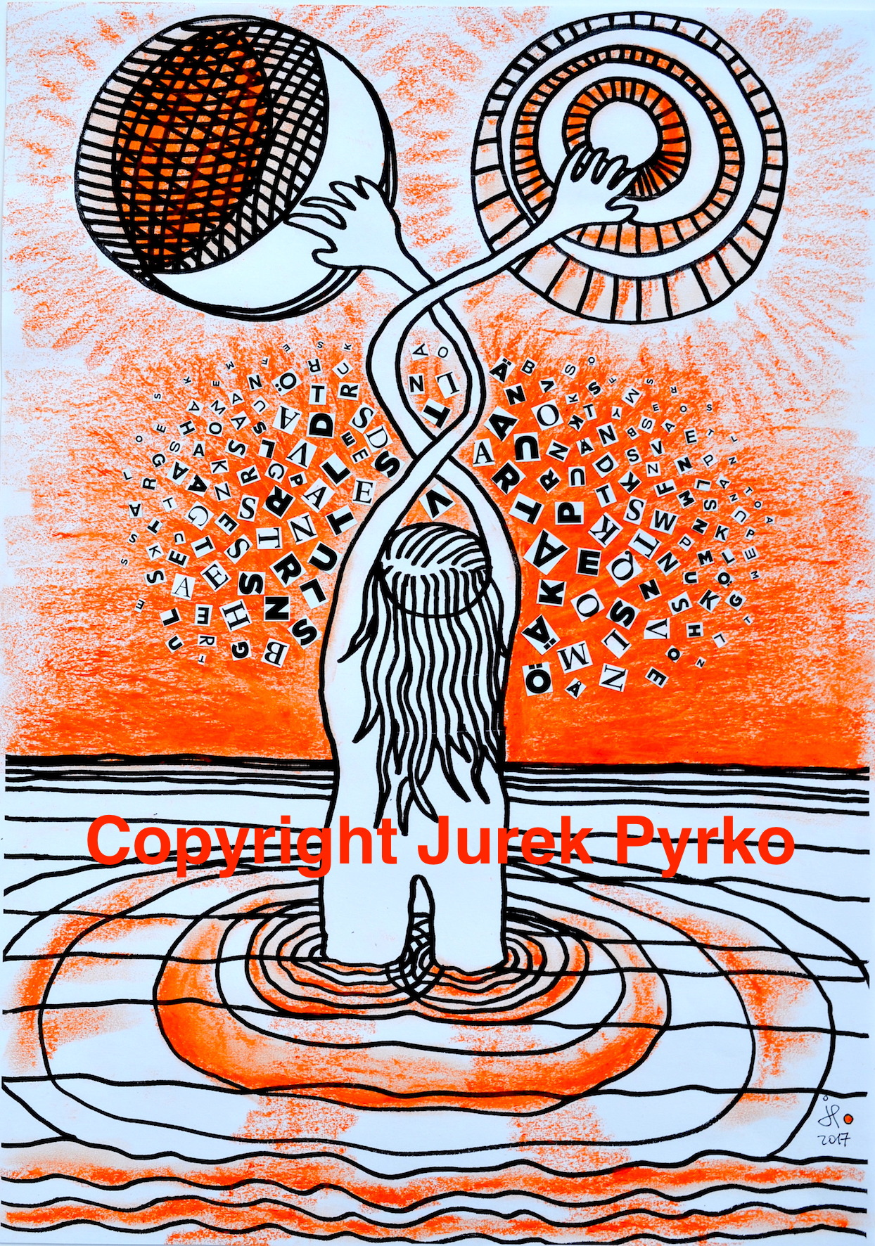 När solen och månen byter plats-Ursinne-2017-JPyrko